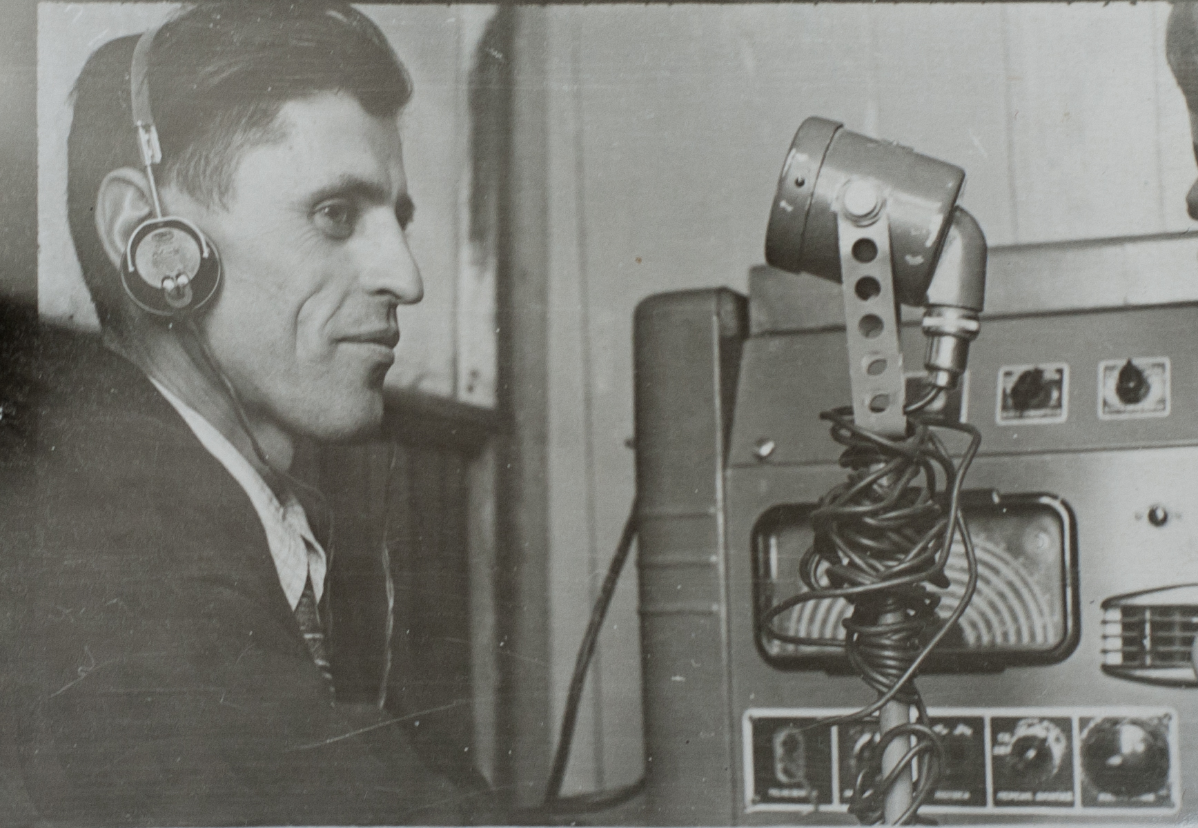 Шукис Альгирдас в кабинете радиотехники